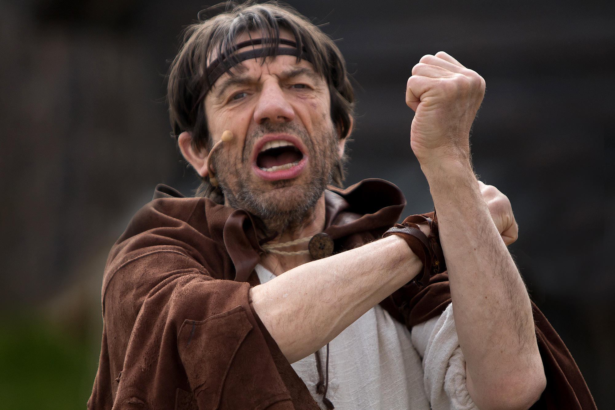 Helge Jordal i rollenn som Solve Skald under Fru Guri av Edøy 2014.